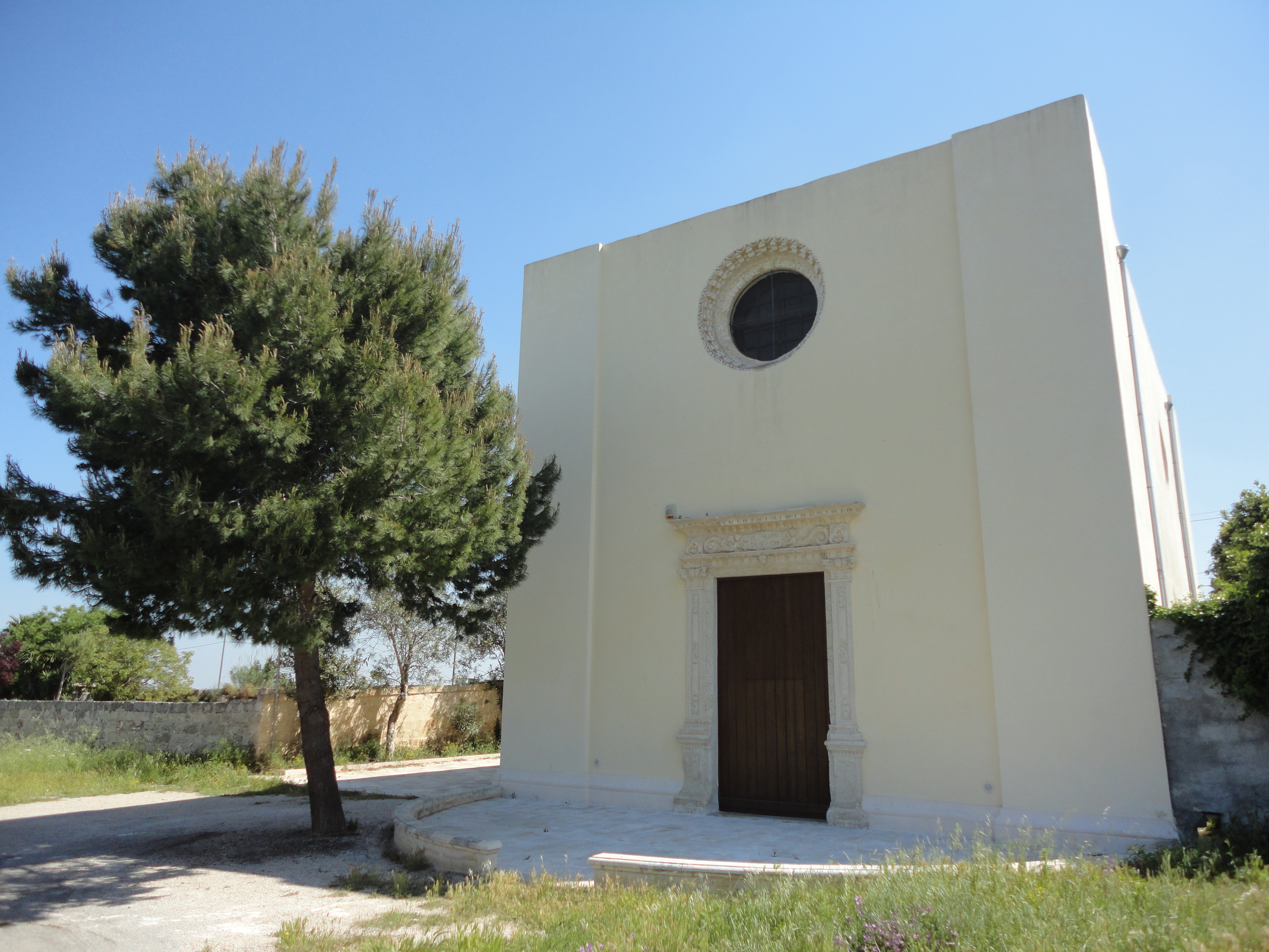 Santuario Madonna della Luce Ugento, Lecce